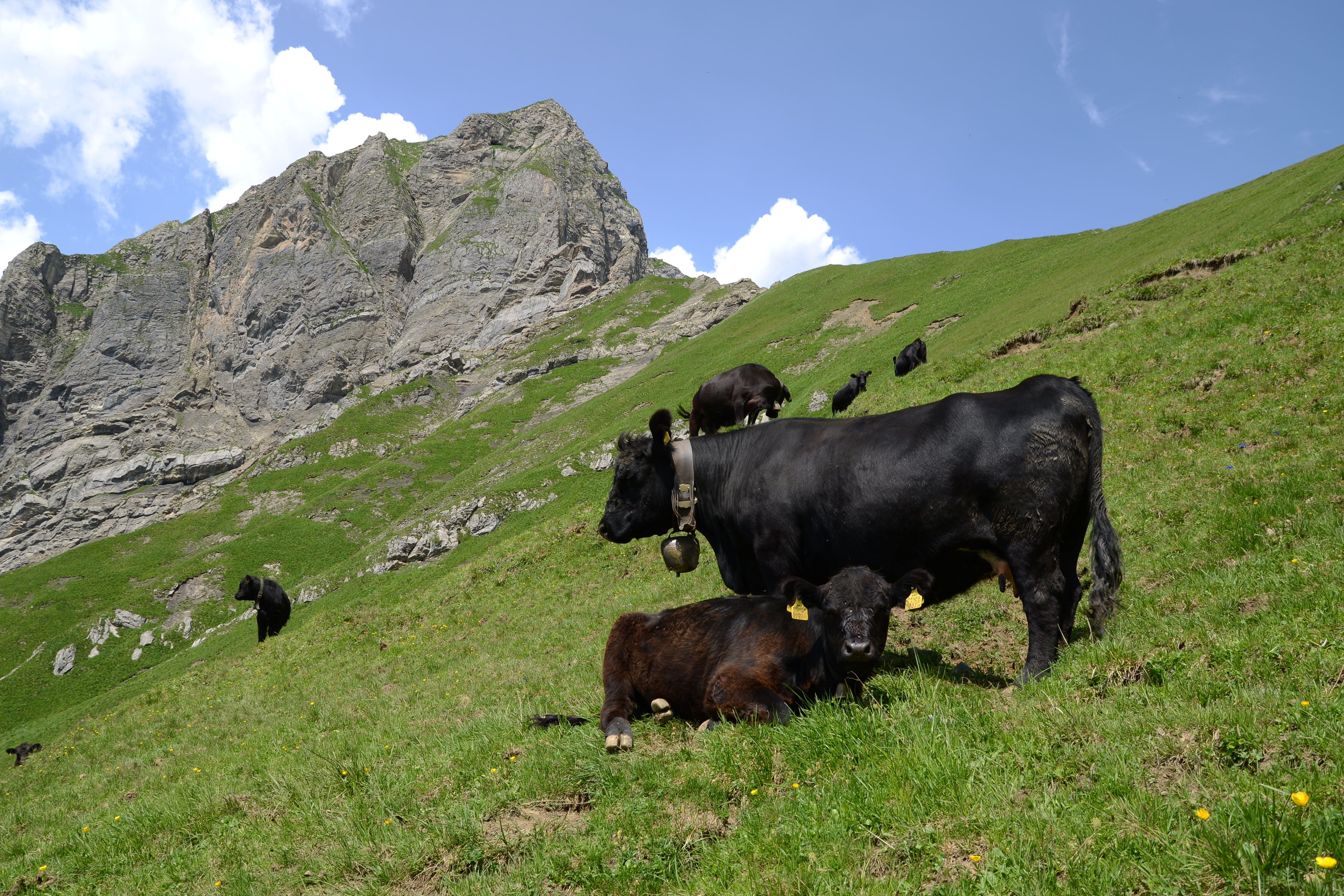 Aberdeen Angus im Gadental an den Steilhängen des Muttawangjoch oder auch Mutterwangjoch genannt. Im Hintergrund die Südflanke des Feuerstein 2271 m.